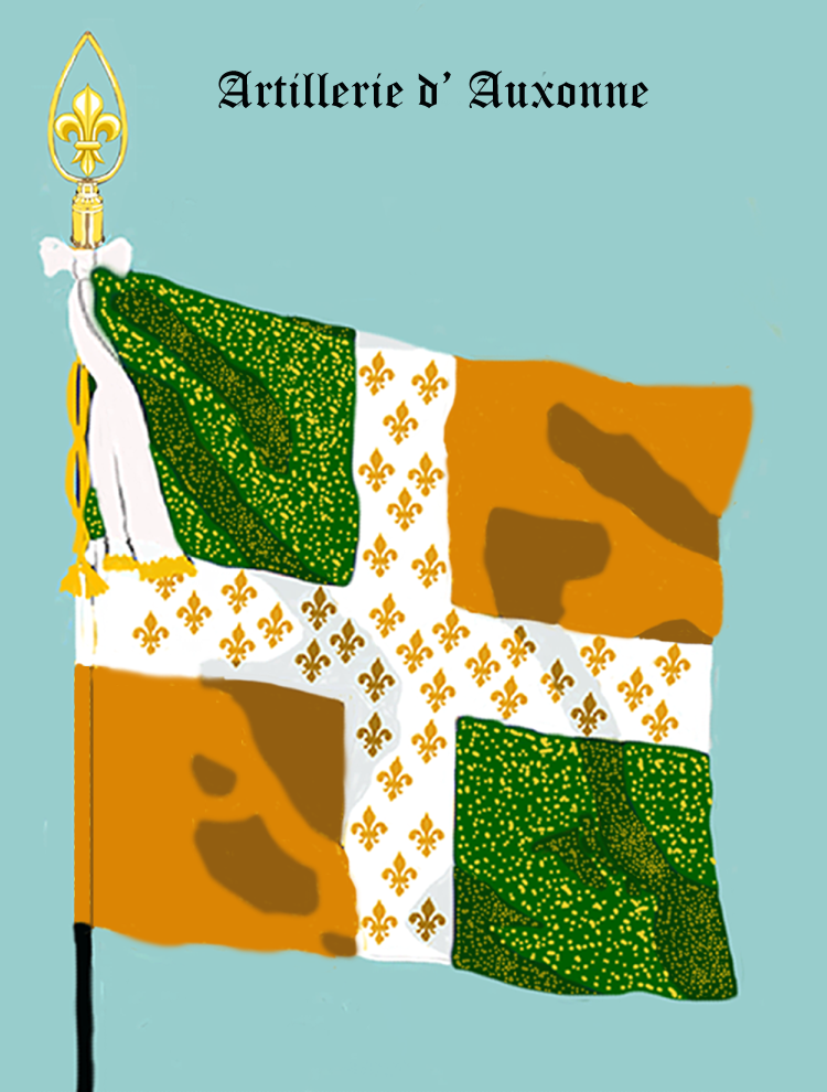 Ordonnanzfahne des königlich französischen „Régiment d'Artillerie de Auxonne“. - Entnommen und überarbeitet aus: „LES UNIFORMES ET LES DRAPEAUX DE L'ARMÉE DU ROI“ Marseille 1899. (Drapeau d'Ordonnance du régiment française royale „Régiment d'Artillerie de Auxonne“.)